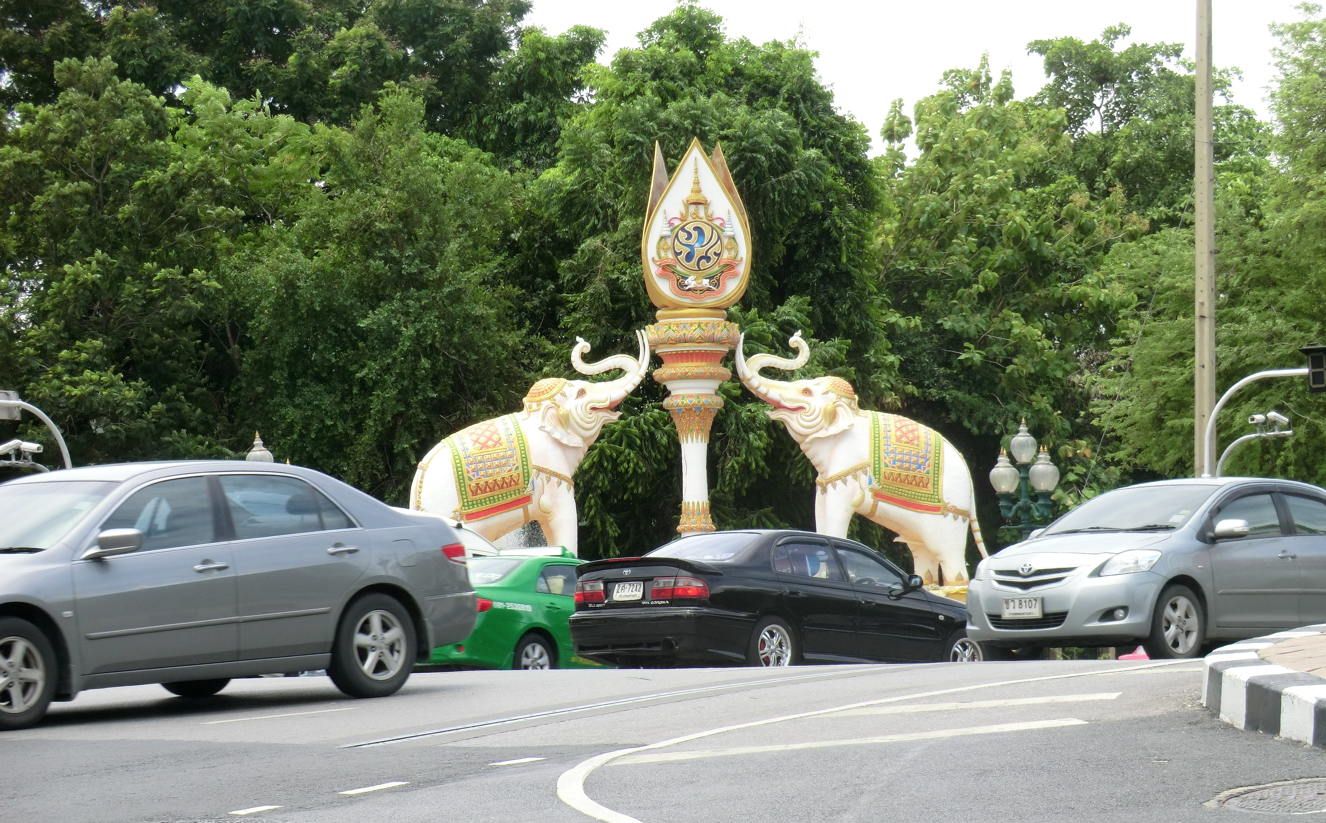 Elephant Monument Bangkok